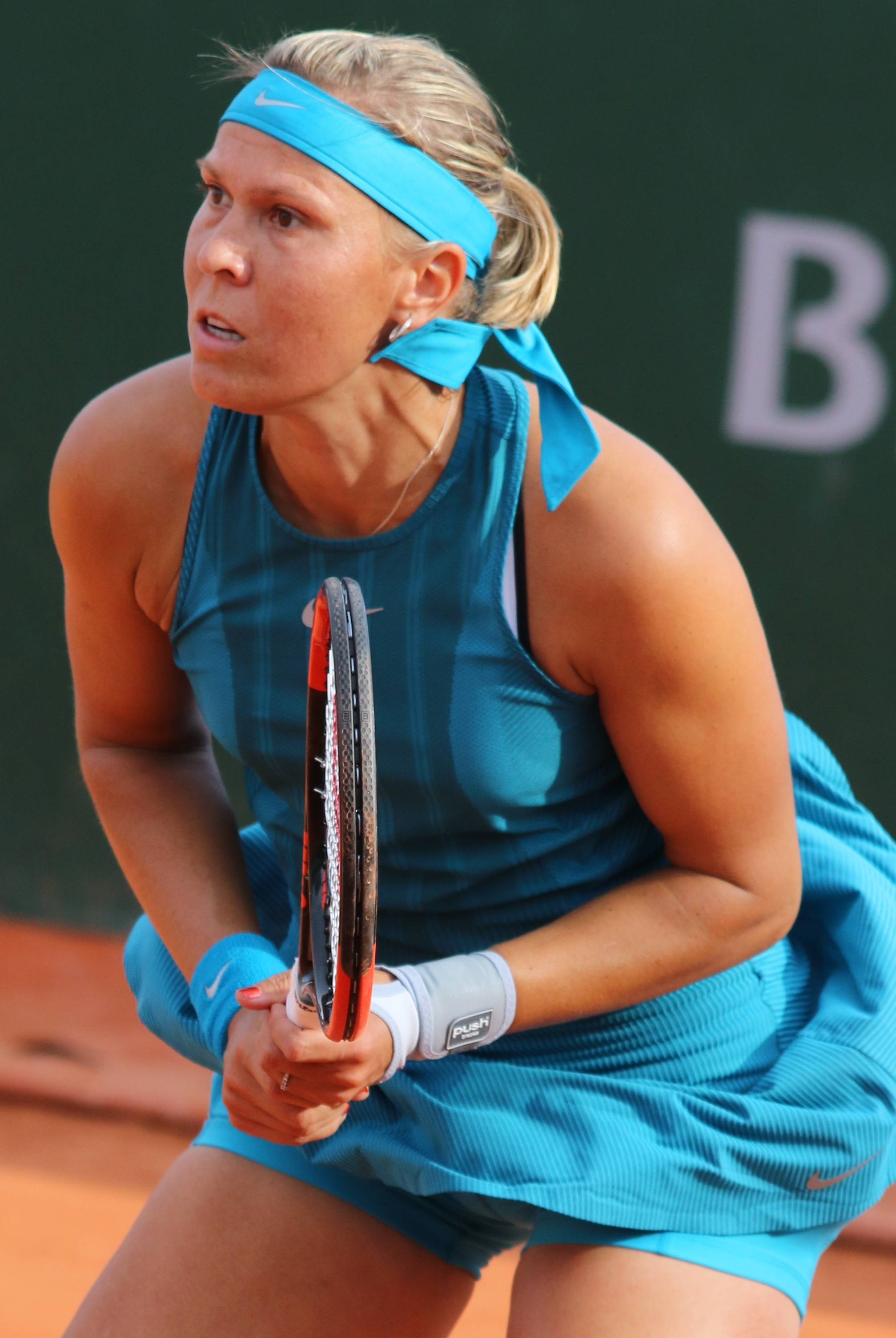 Hradecka RG18 (3)